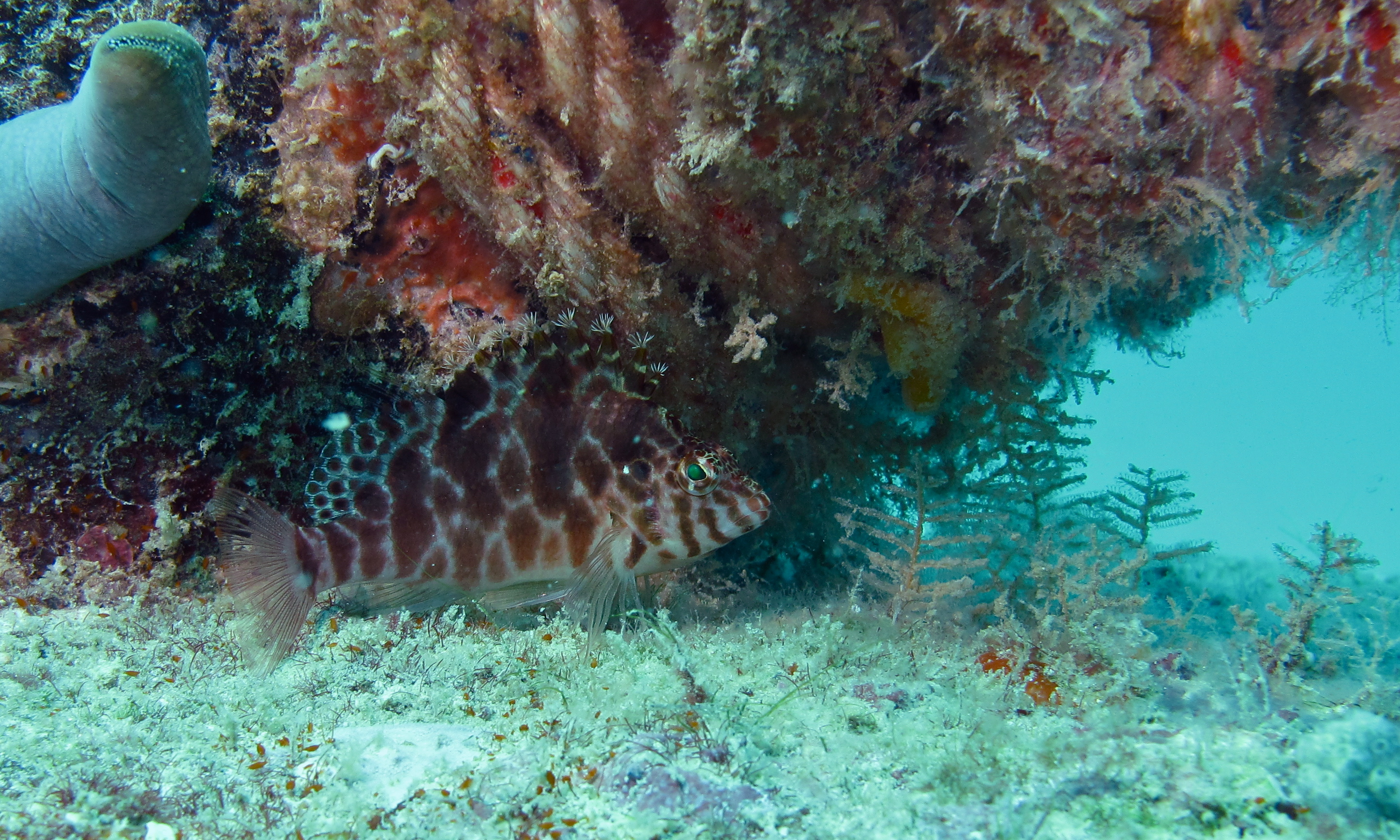 Paradise III, Mabul, Sabah, MALAYSIA